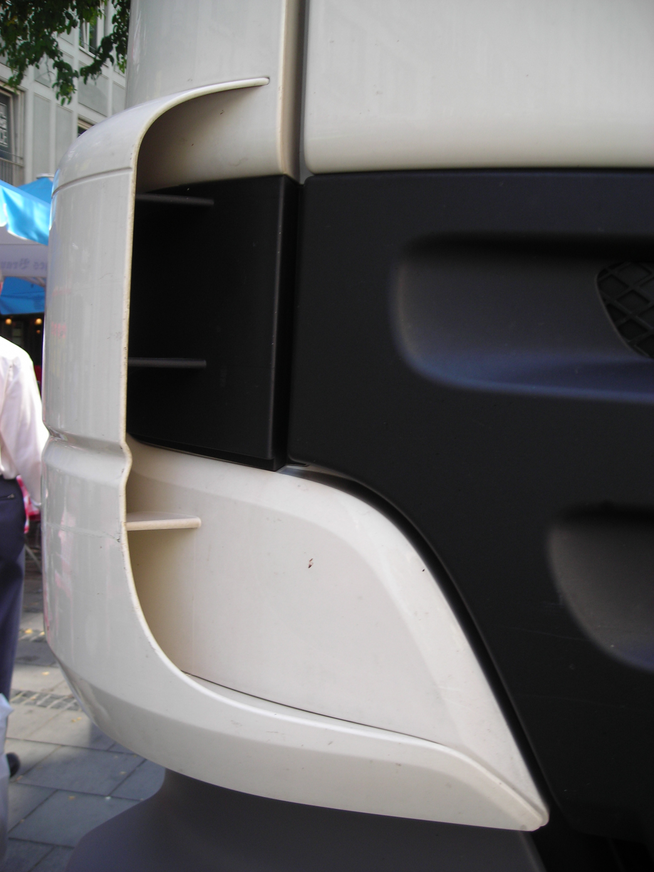 Seitenspoiler eines LKW (Mercedes-Benz Actros)